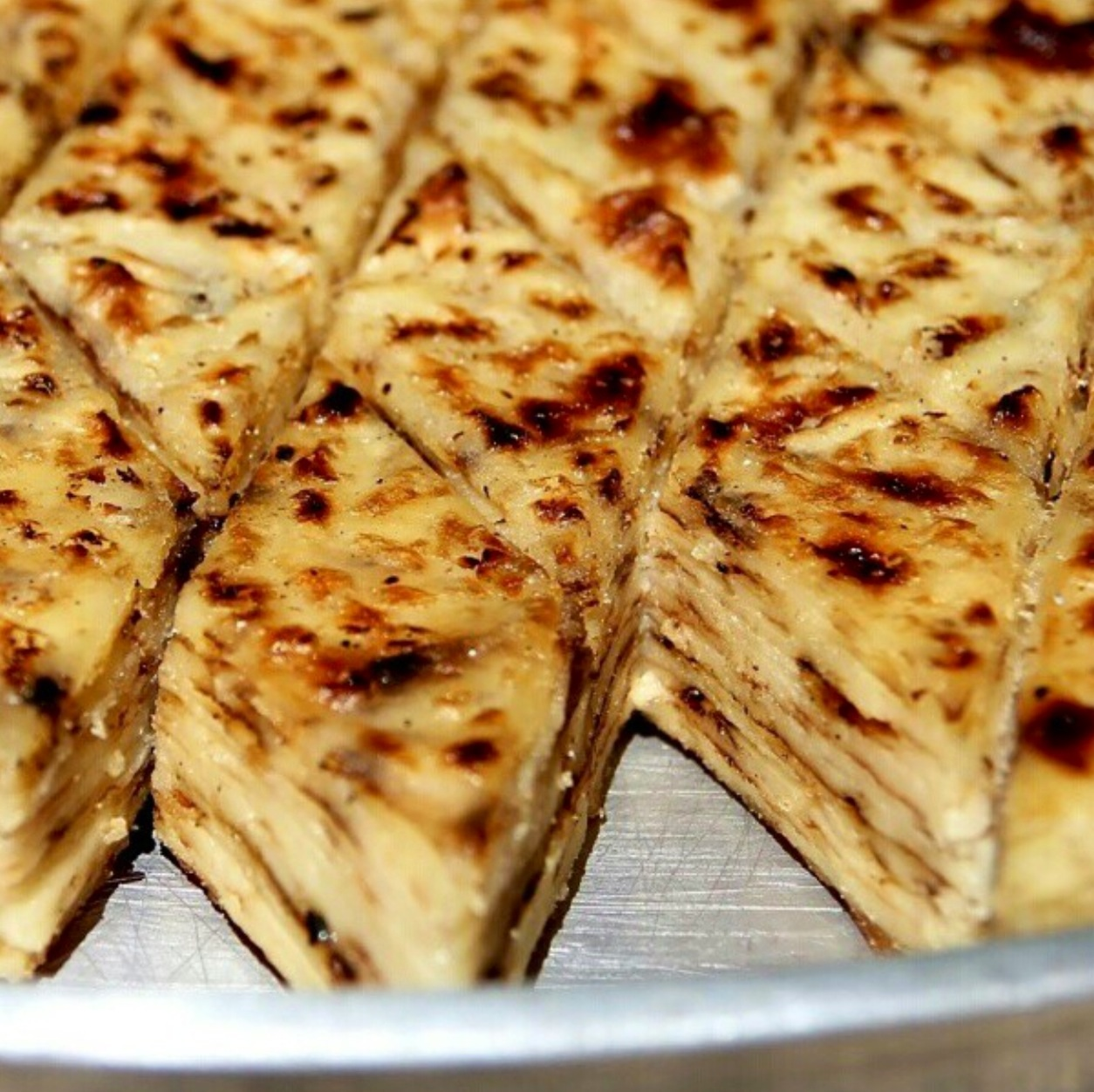 Подготвено ѓомлезе.